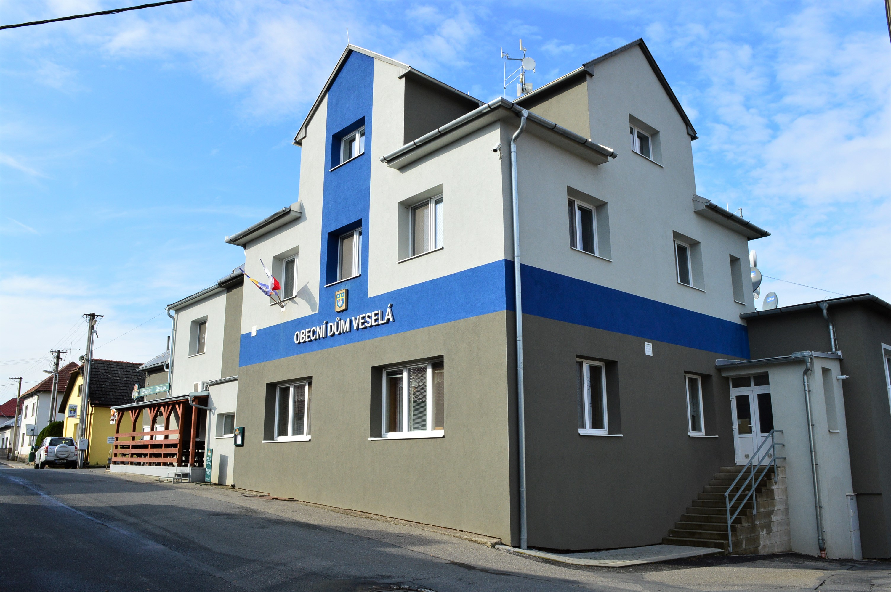 Obecní úřad Veselá